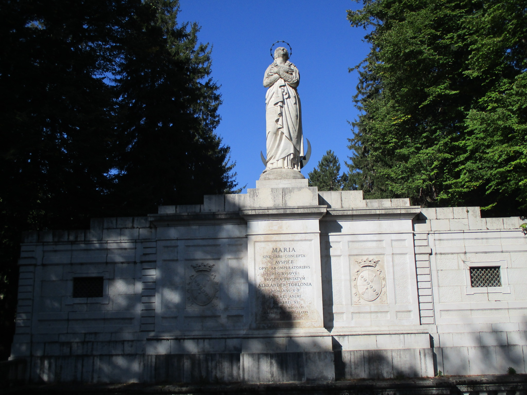 Il monumentale Incile del Fucino